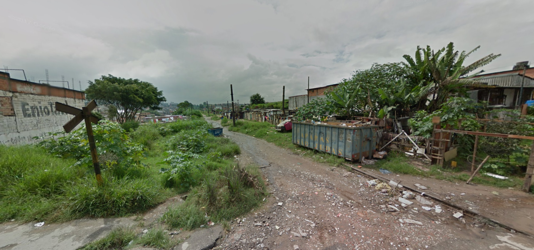 Estação Varginha, já demolida em março de 2011. Ainda restavam parte dos trilhos, postes e equipamentos da passagem de nível na época.